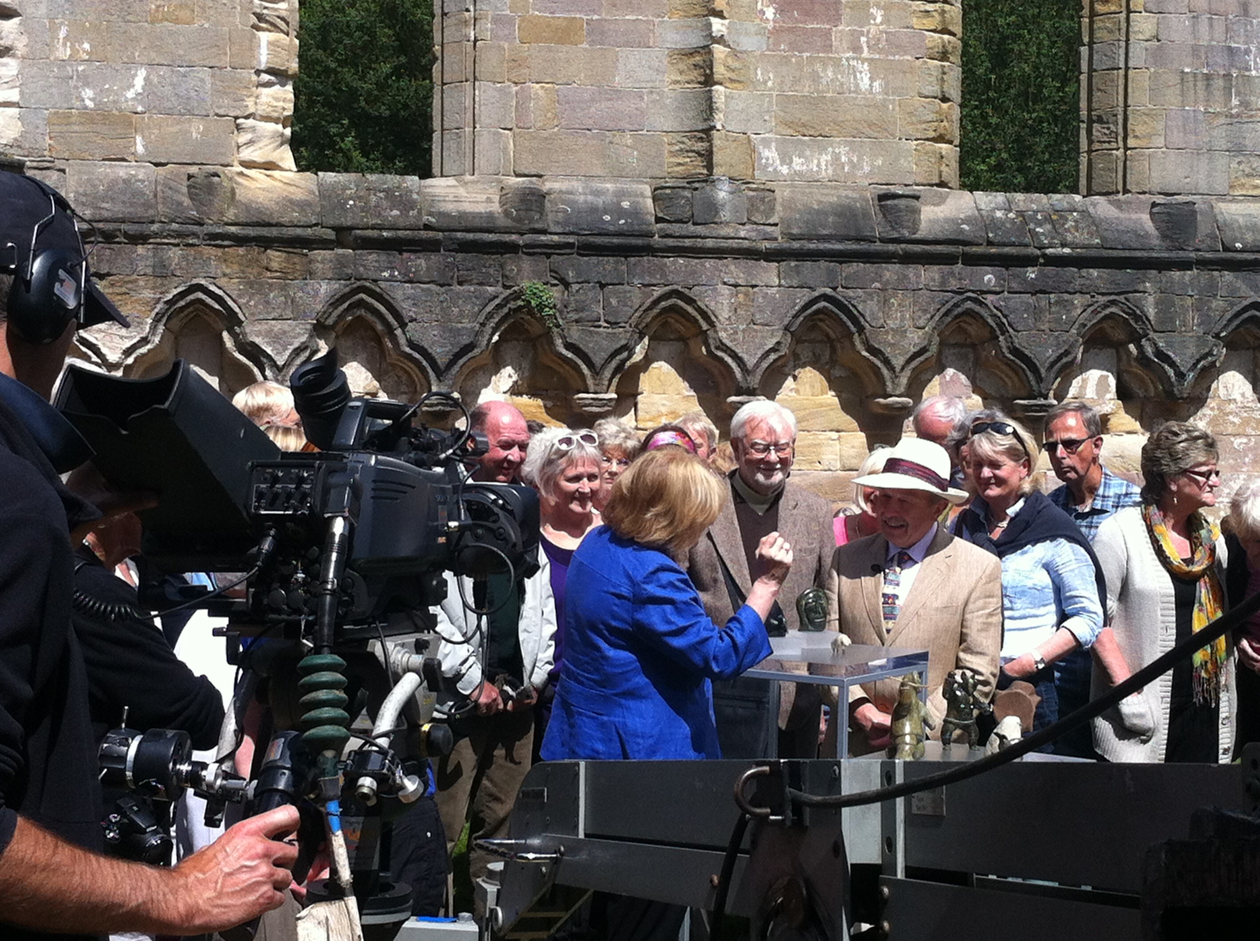 Innspilling av Antiques Roadshow i ruinene etter Fountains Abbey, Yorkshire, juli 2012